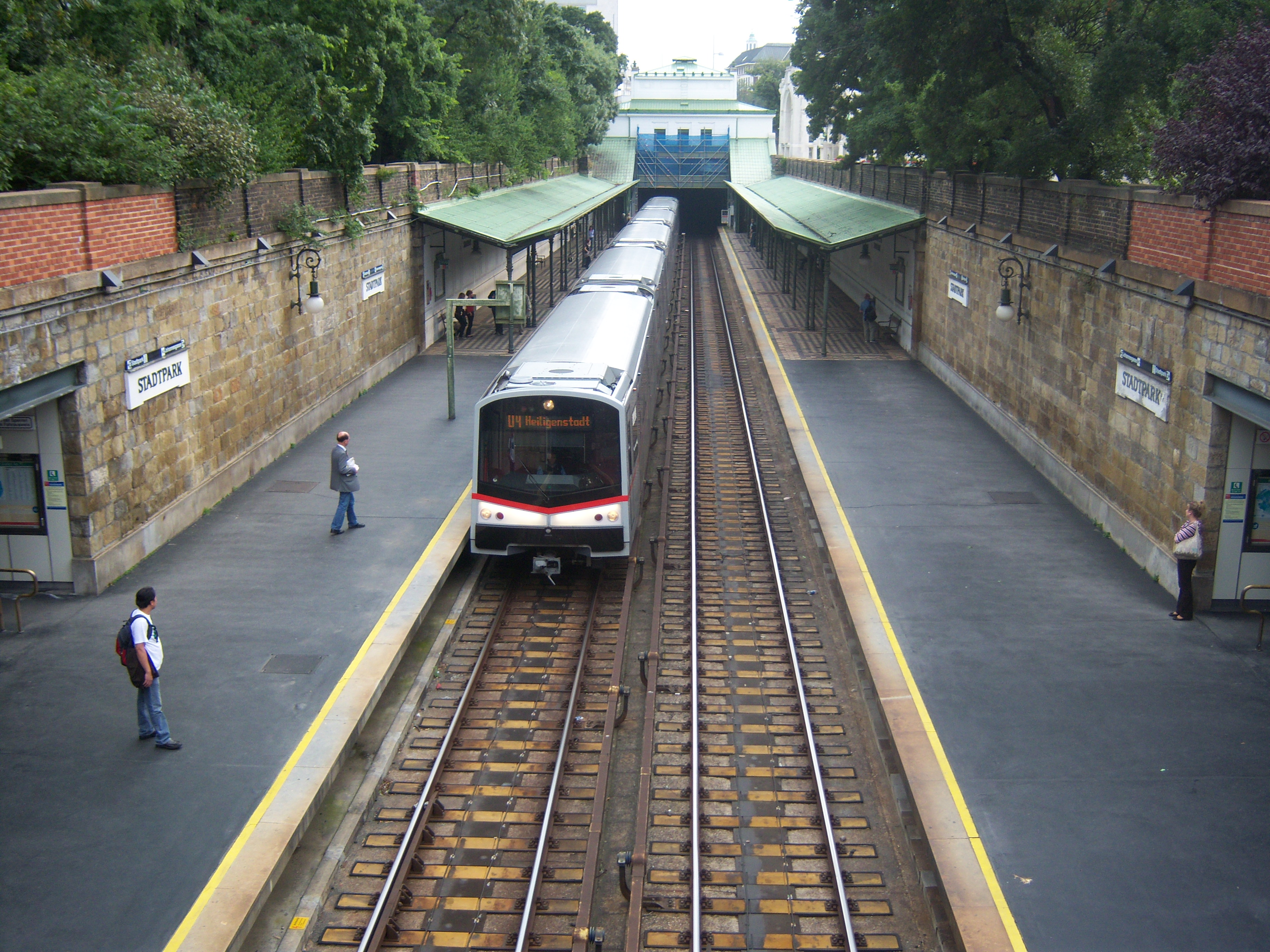 U-Bahn-Station Stadtpark. Zug Typ V